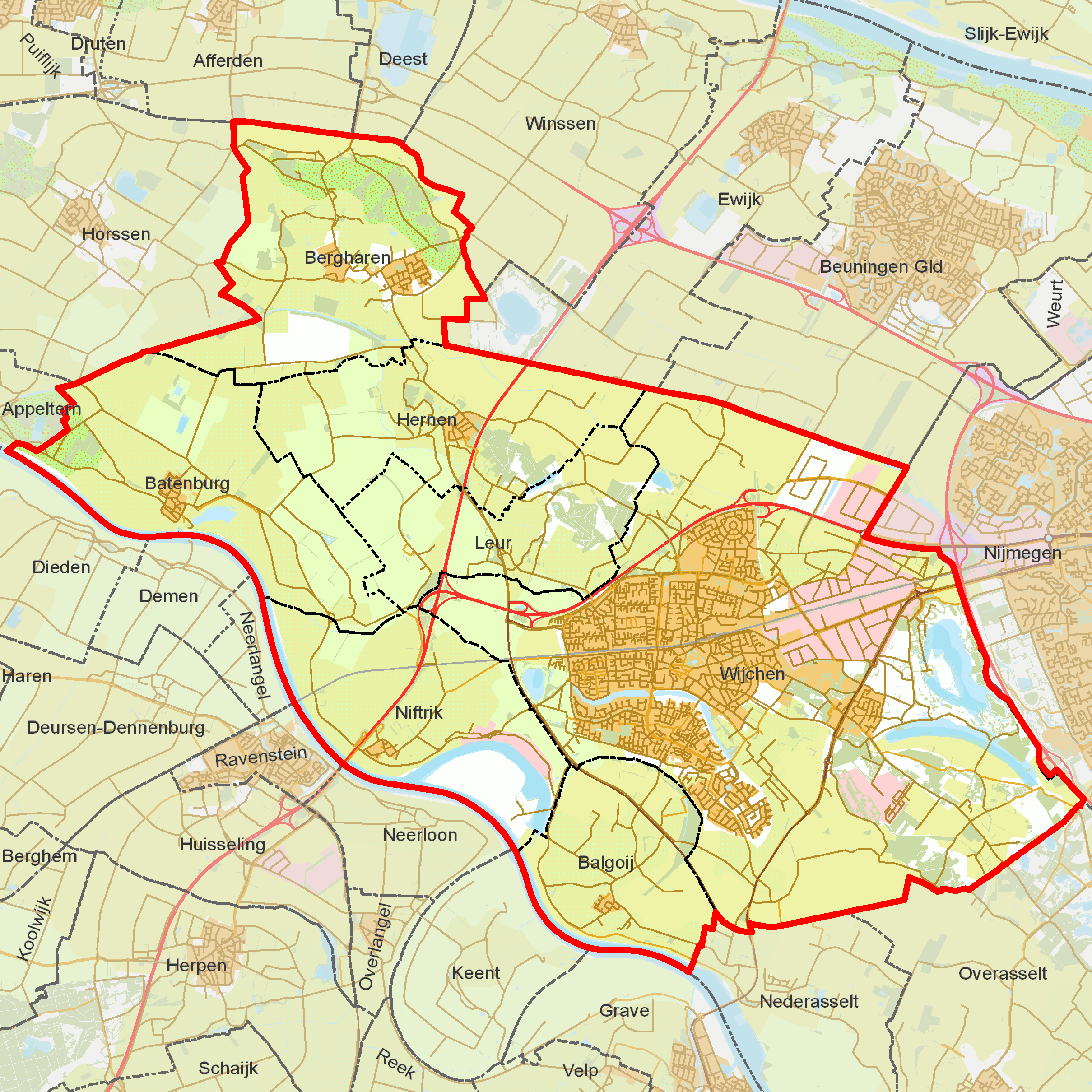 BAG woonplaatsen - Gemeente Wijchen.png